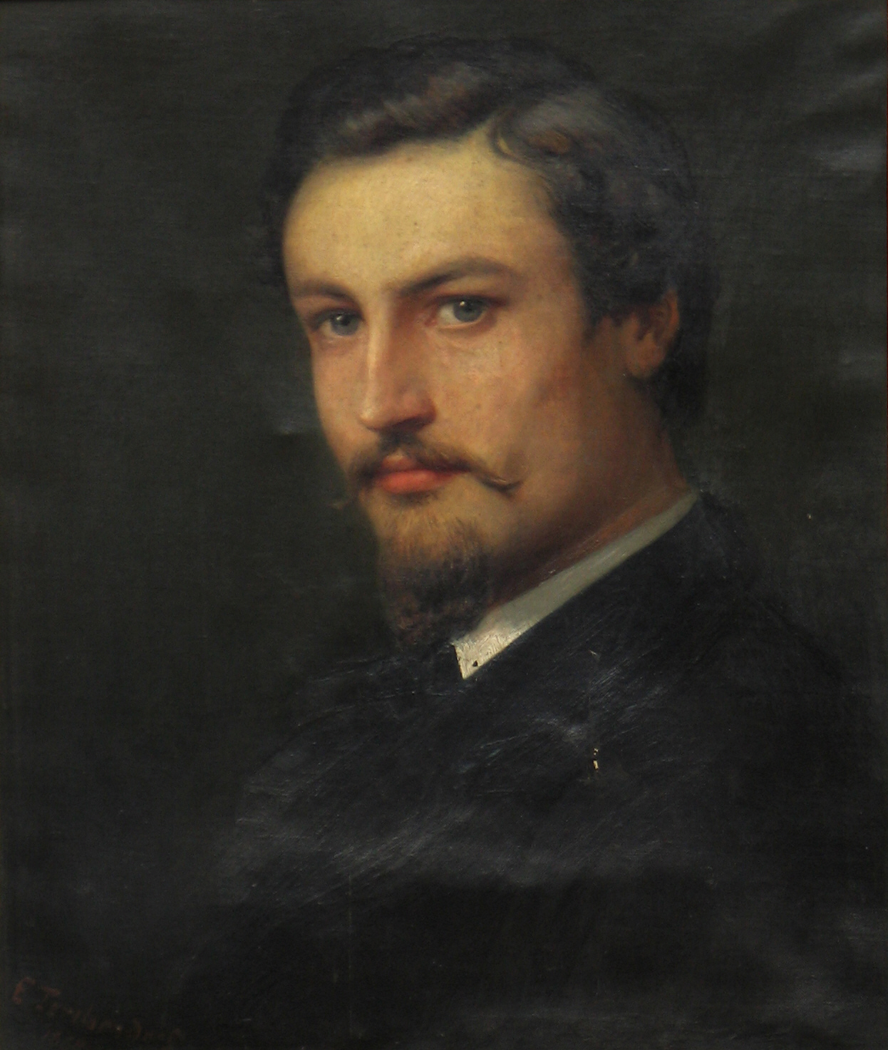 Johannes Schmidt, Öl auf Leinwand, 1868